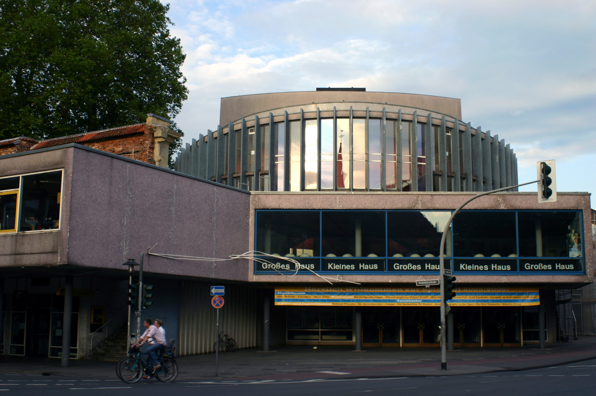 Münster, Stadttheater